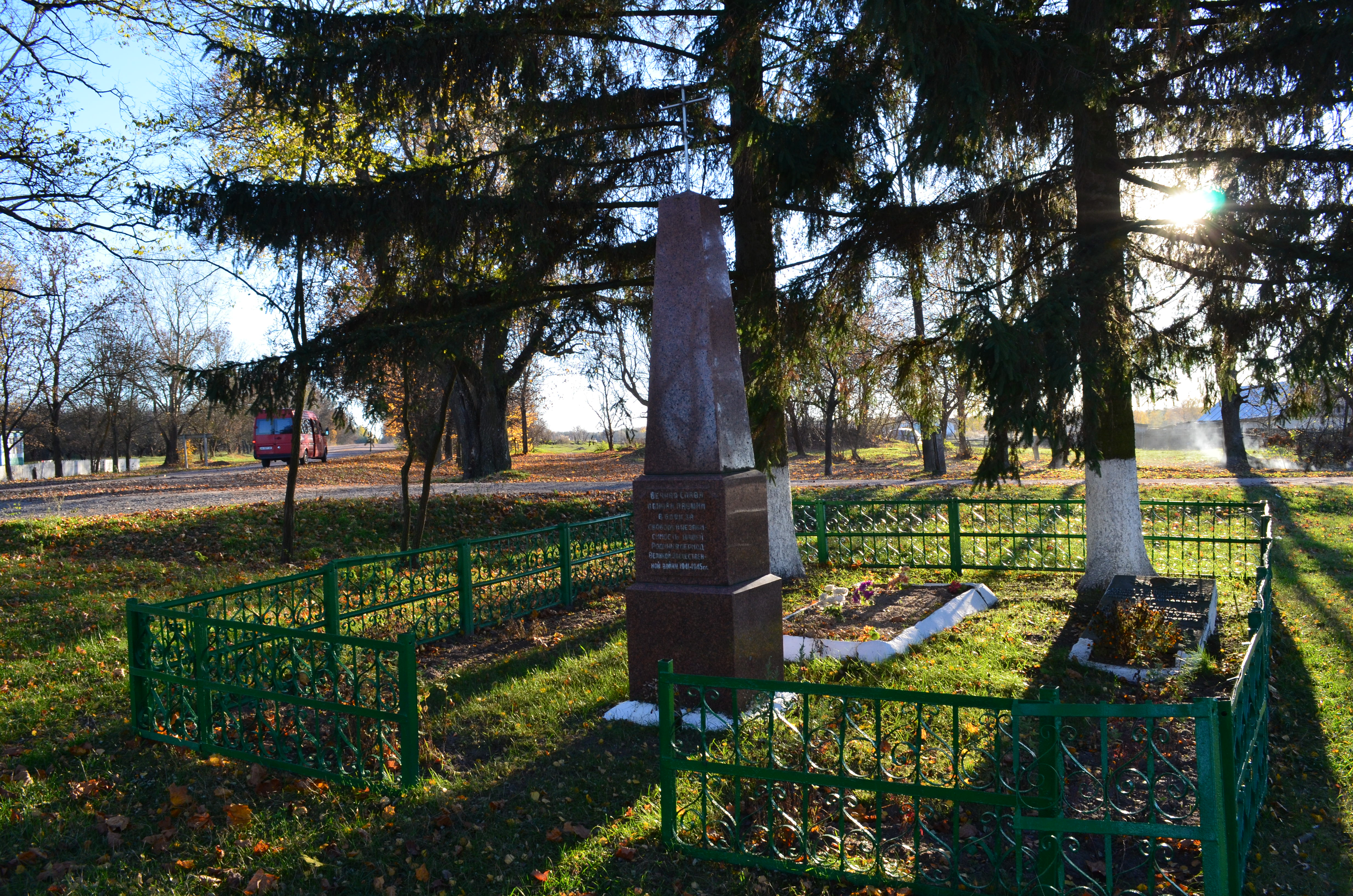 Група (2) братських могил радянських воїнів та партизан. Поховано 14 чоловік. Коростенський район, с. Сантарка, e центрі села